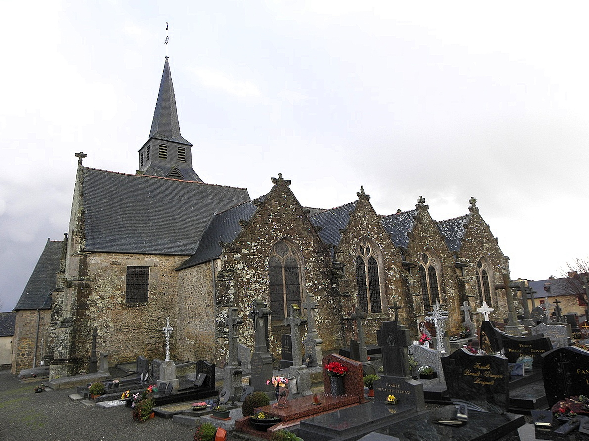 Flanc nord de l'église Saint-Léon de La Baussaine (35).